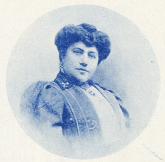 Retrato de la periodista y escritora española Carmen Blanco y Trigueros, en la revista Feminal.